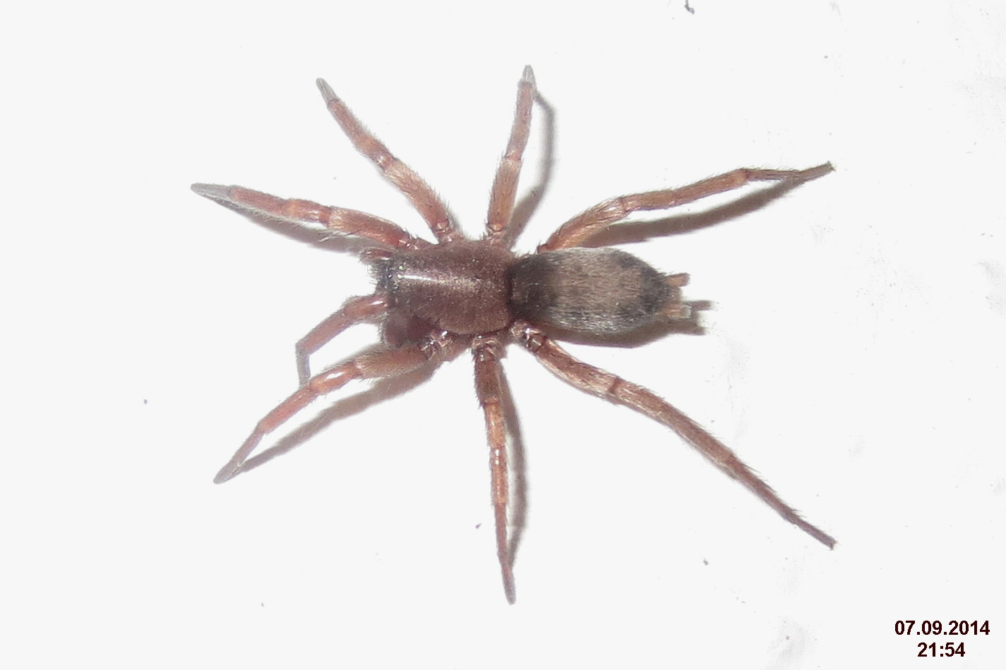 Scotophaeus blackwalli - skálovka Blackwallova.